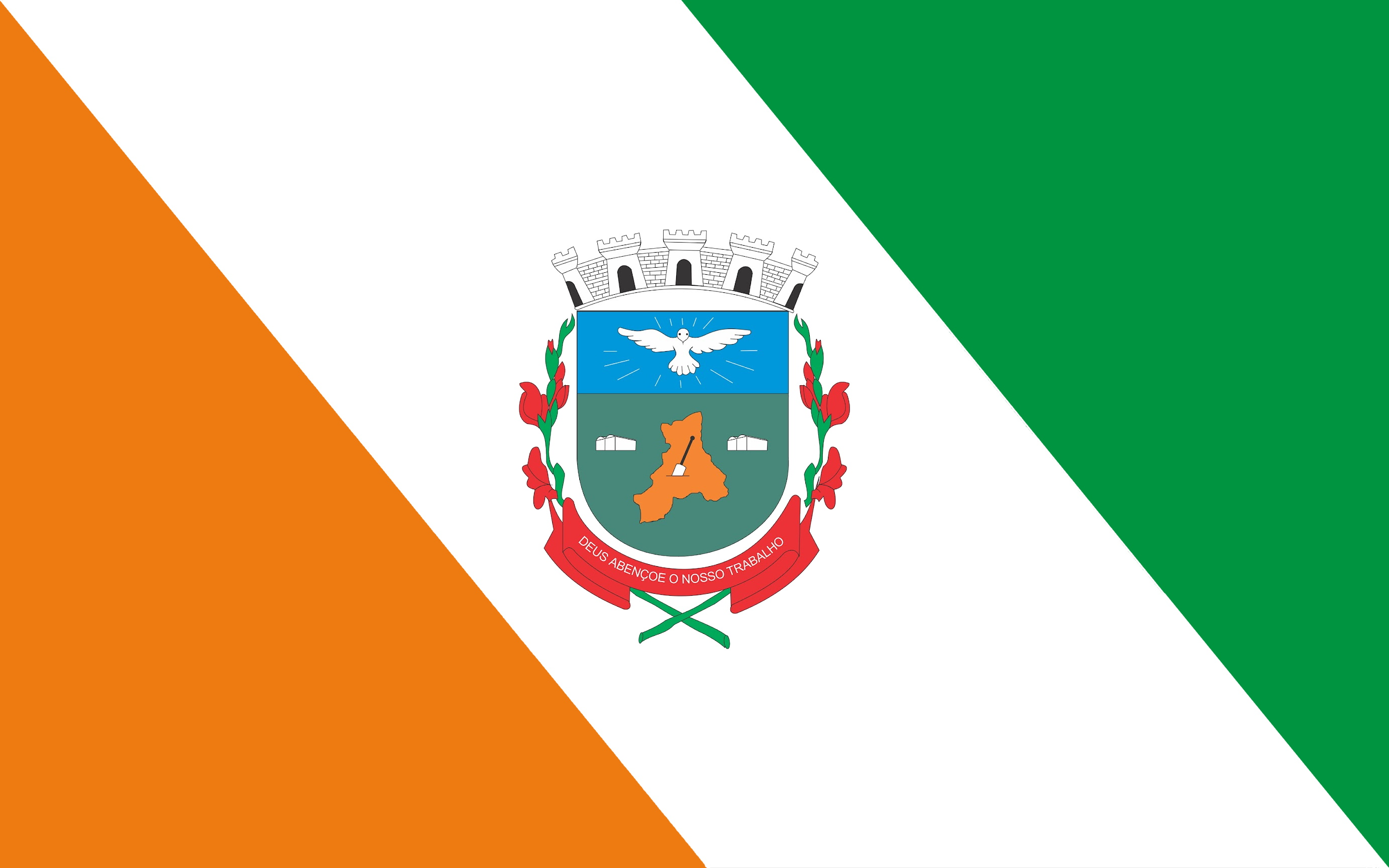 Bandeira do município de .